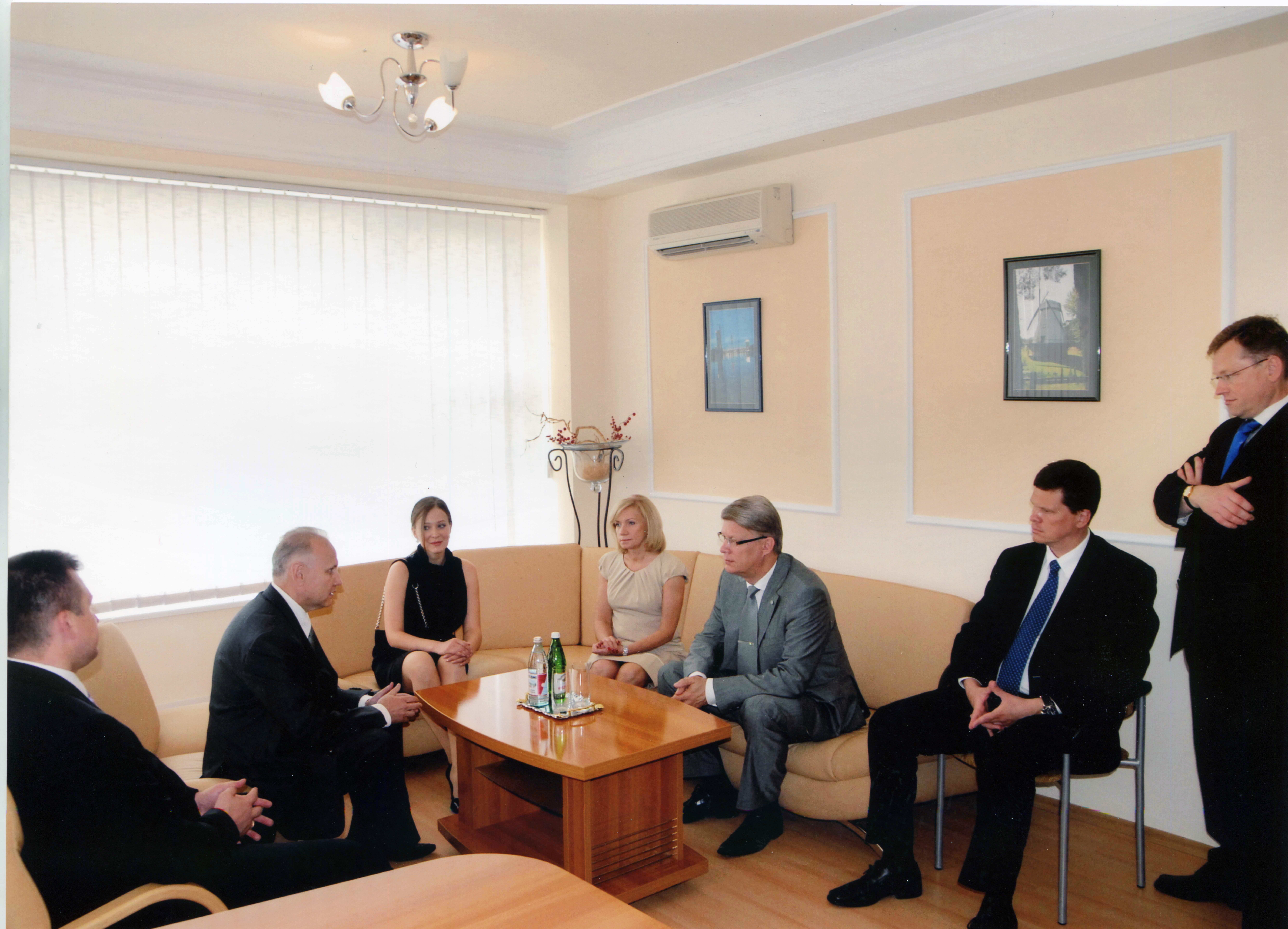 Президент Латвійської Республіки Валдіс Затлерс у Почесному консульстві Латвії, 27 червня 2008 року. На фото (зліва направо): Міністр транспорту Латвії Айнар Шлесер, Почесний консул Латвійської Республіки Володимир Гарцула і його дружина Олена Гарцула, дружина Президента Латвії Ліліта Затлерс, Президент Латвійської Республіки Валдіс Затлерс, Міністр економіки Латвії Каспарс Герхардс, Надзвичайний та Повноважний Посол Латвійської Республіки в Україні Атіс С'янітс.